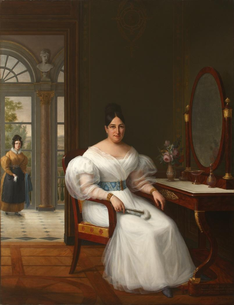 Retrato de María del Carmen Moreno, marquesa consorte de las Marismas del Guadalquivir y esposa del banquero español Alejandro María Aguado.